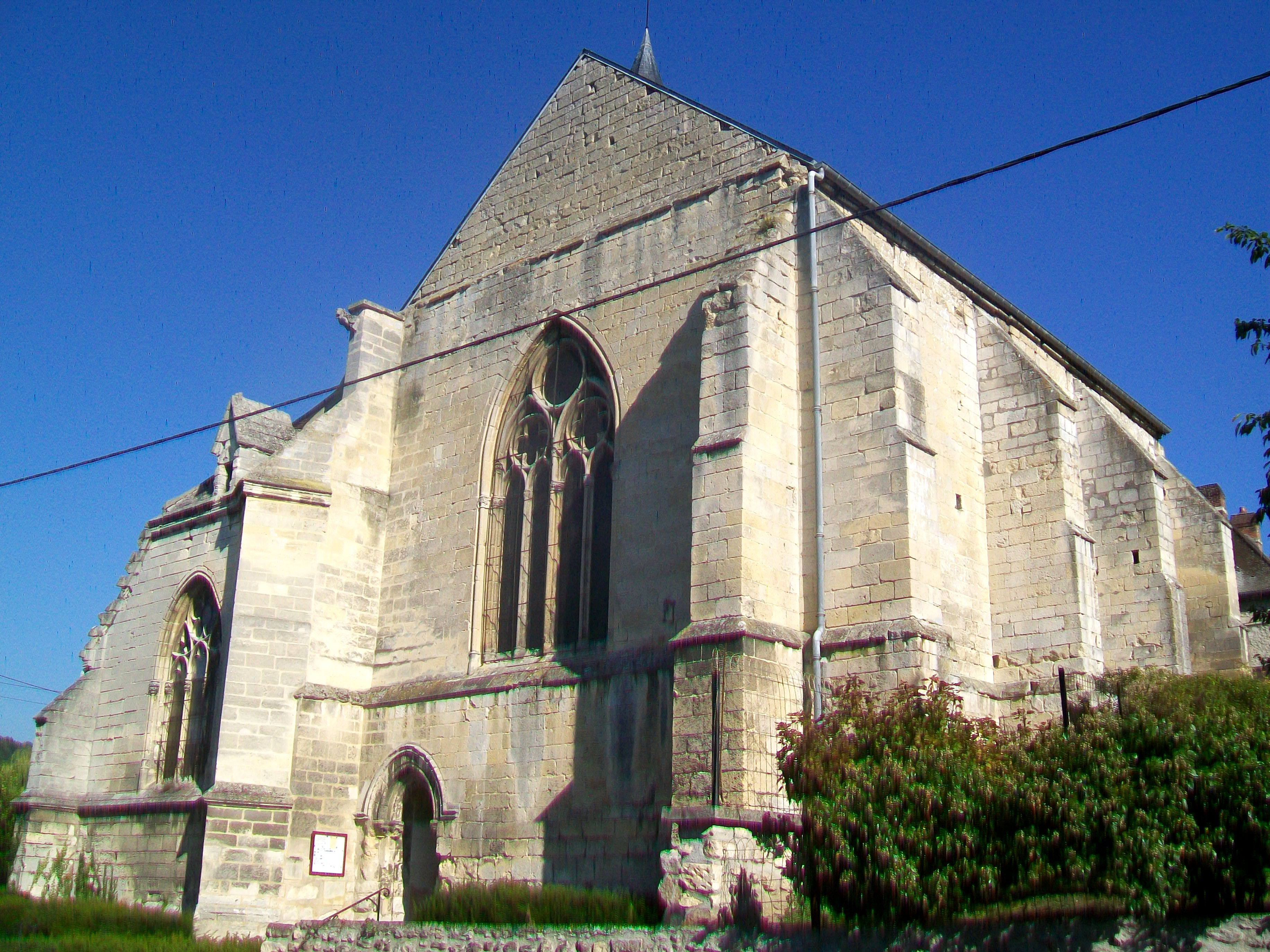 Le chœur avec ses deux chapelles latérales, formant un ensemble hétérogène, et le transept d'une campagne de construction antérieure (à gauche).